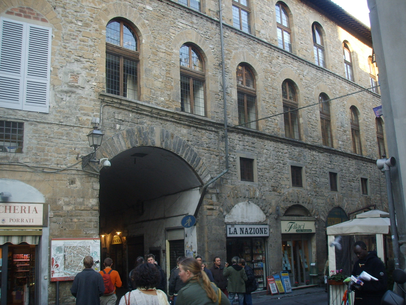 Arco di San Pierino in Florence, Italy